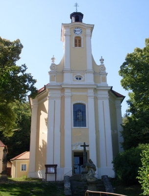 Kostel sv. Isidora Luleč